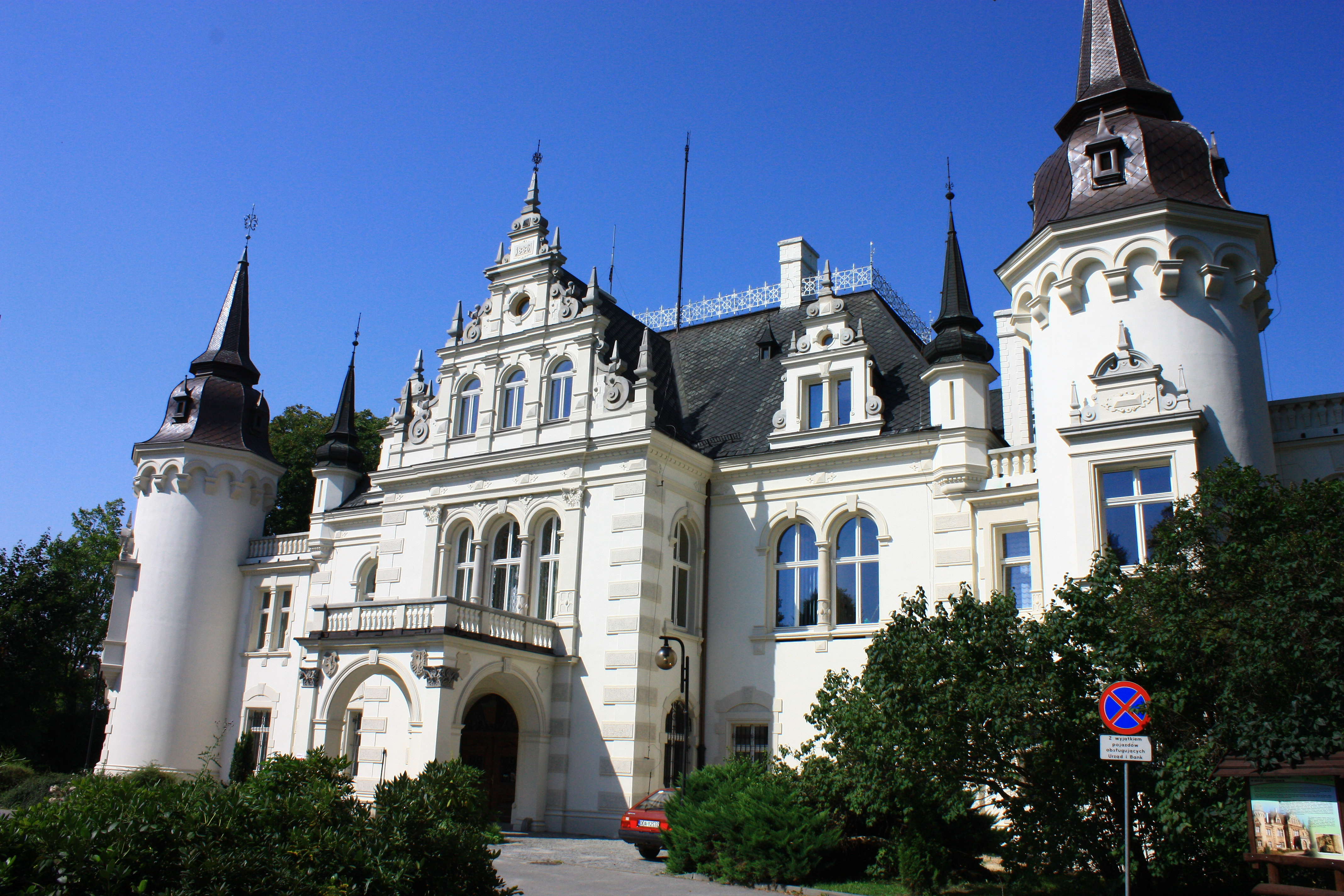 Jelcz-Laskowice, Pałac Sauermów, ob. UMiG, 1886